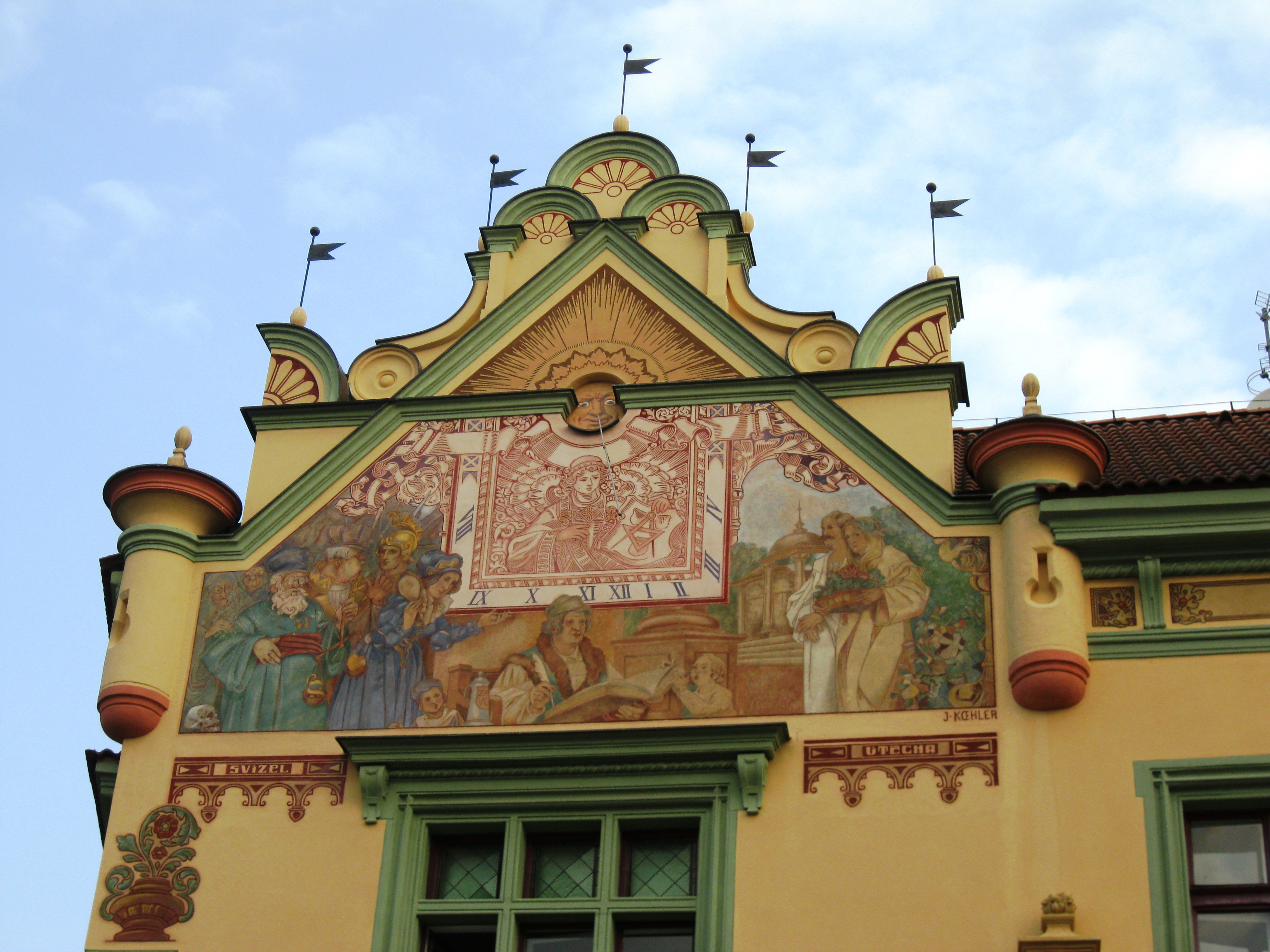 Městský dům Hanačka (Prostějov), Rejskova 2992/2, Prostějov